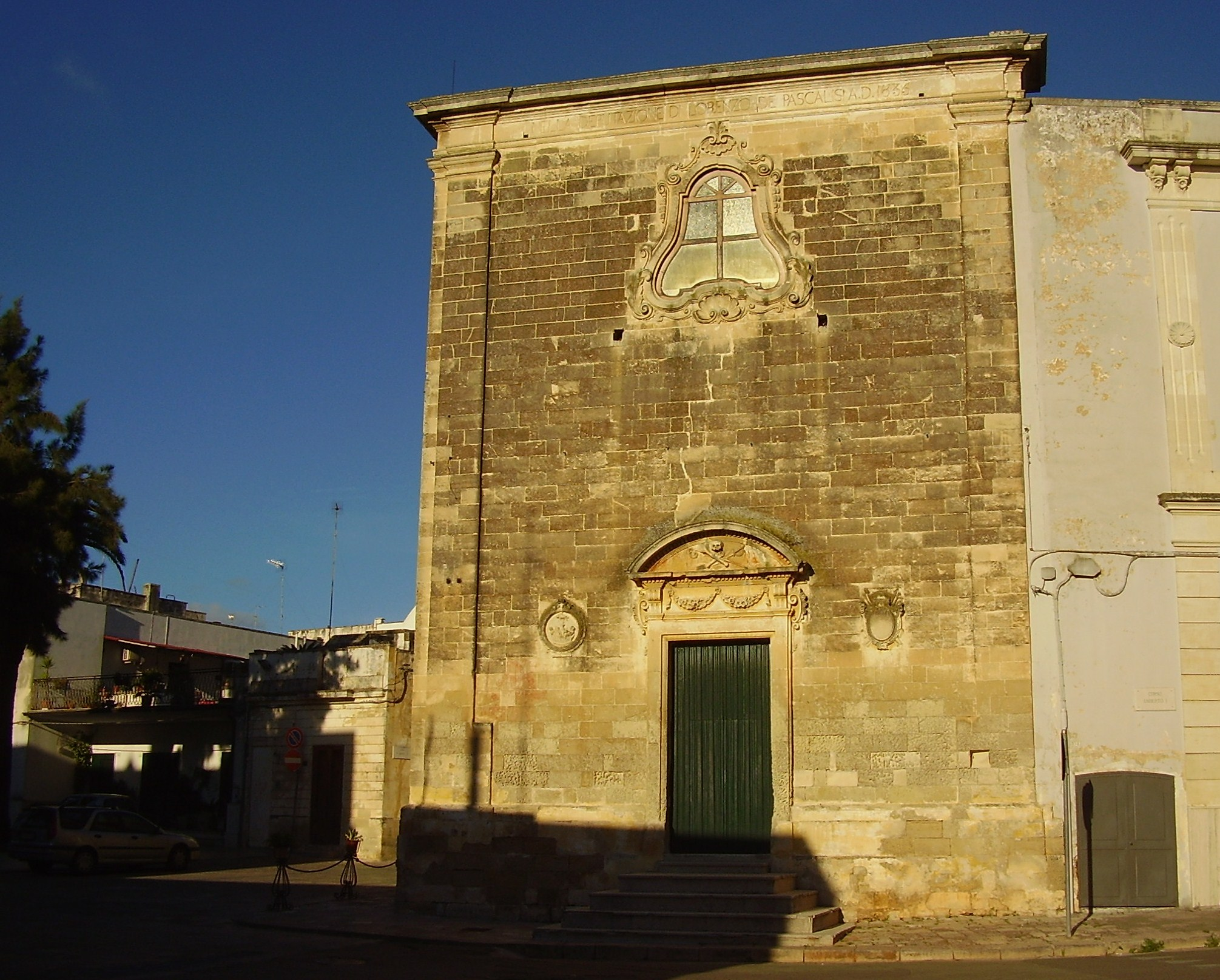 Chiesa della Anime Sante del Purgatorio Sogliano Cavour, Lecce